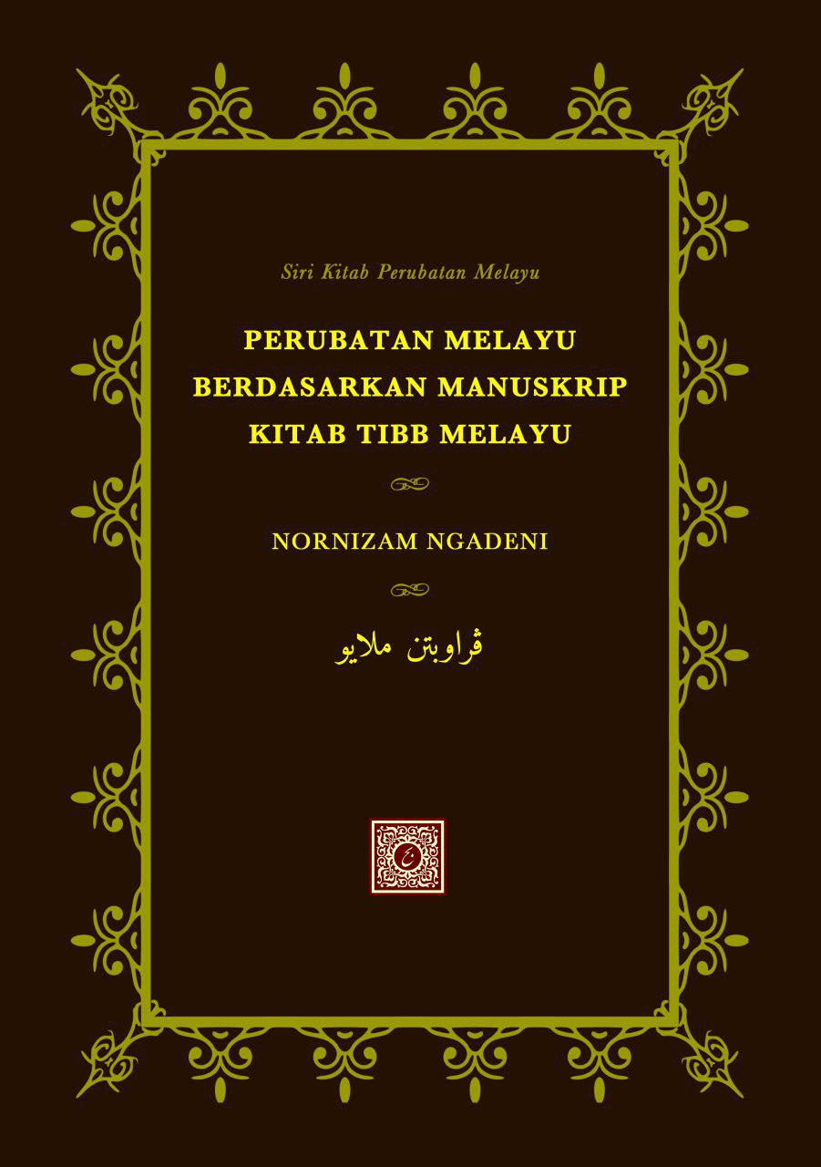 Sebuah kitab membicarakan Perubatan Melayu berkaitan prinsip-prinsip asas ilmu Perubatan Melayu bersumberkan manuskrip Kitab Tibb Melayu , Bustan al-Salatin, Ar-Rahmah fi tibb wal Hikmah dan lain-lain lagi